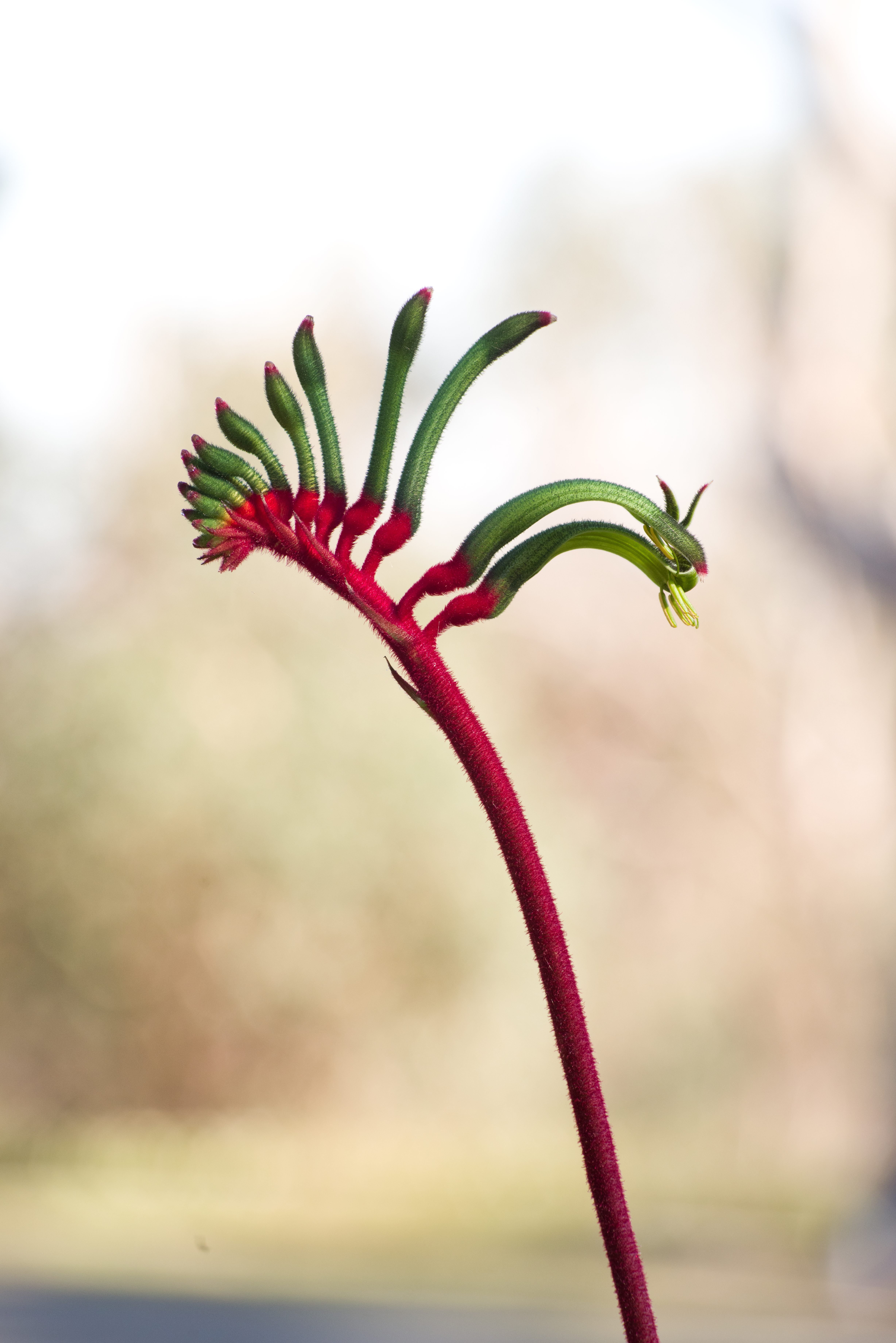 Anigozanthos manglesii